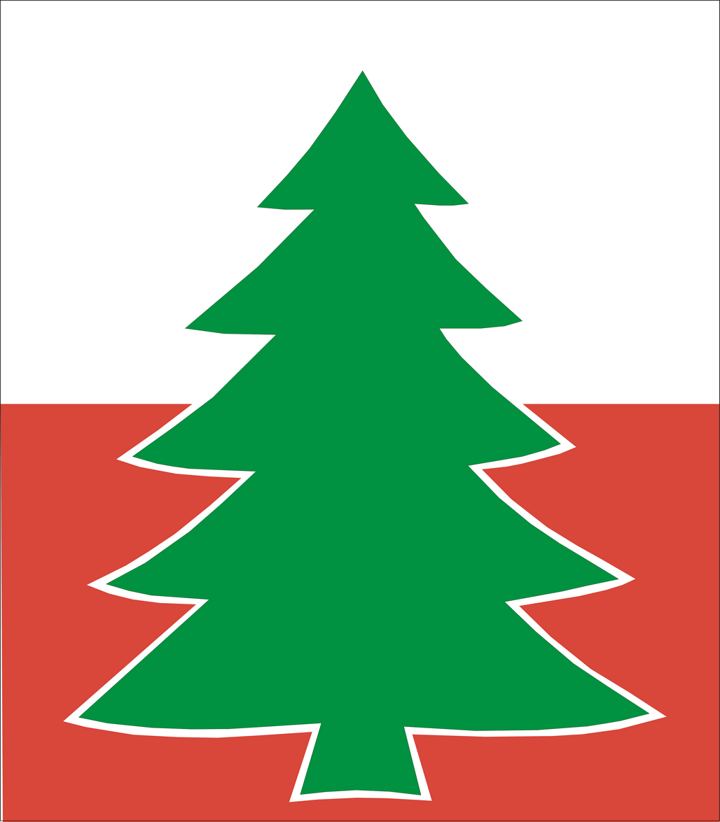 Oznaka rozpoznawcza 3 Dywizji Strzelców Karpackich Polskich Sił Zbrojnych na Zachodzie, stosowana od grudnia 1942